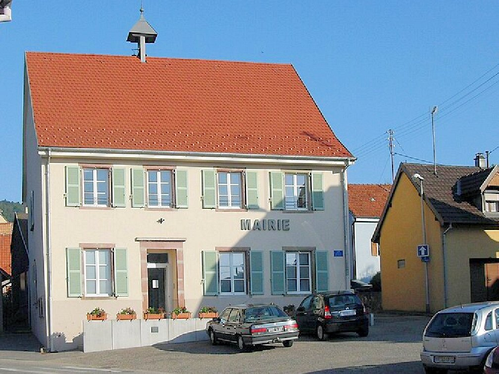 La mairie de Leimbach